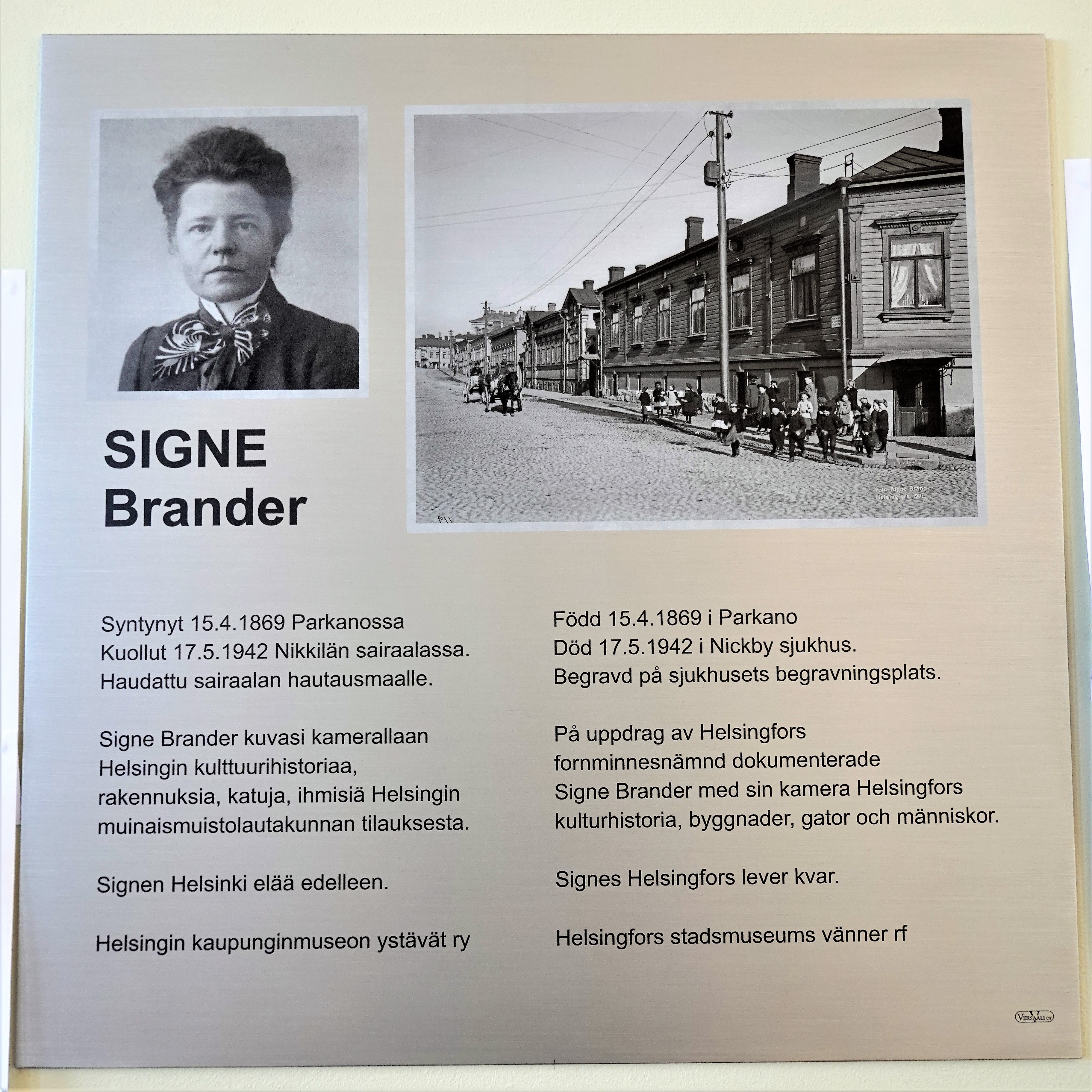 metallilaatta kuvia tekstiä